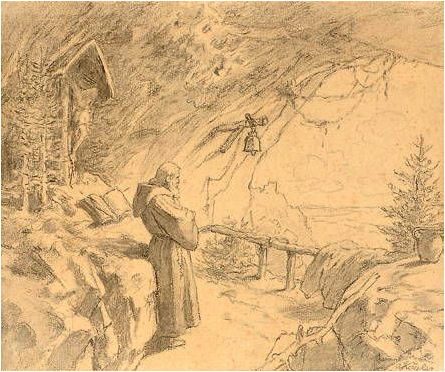 Kaspar Kögler: Eremit in einer Höhle, o.J., Kohlezeichnung auf Papier, 29 x 35 cm, Privatsammlung Wiesbaden.